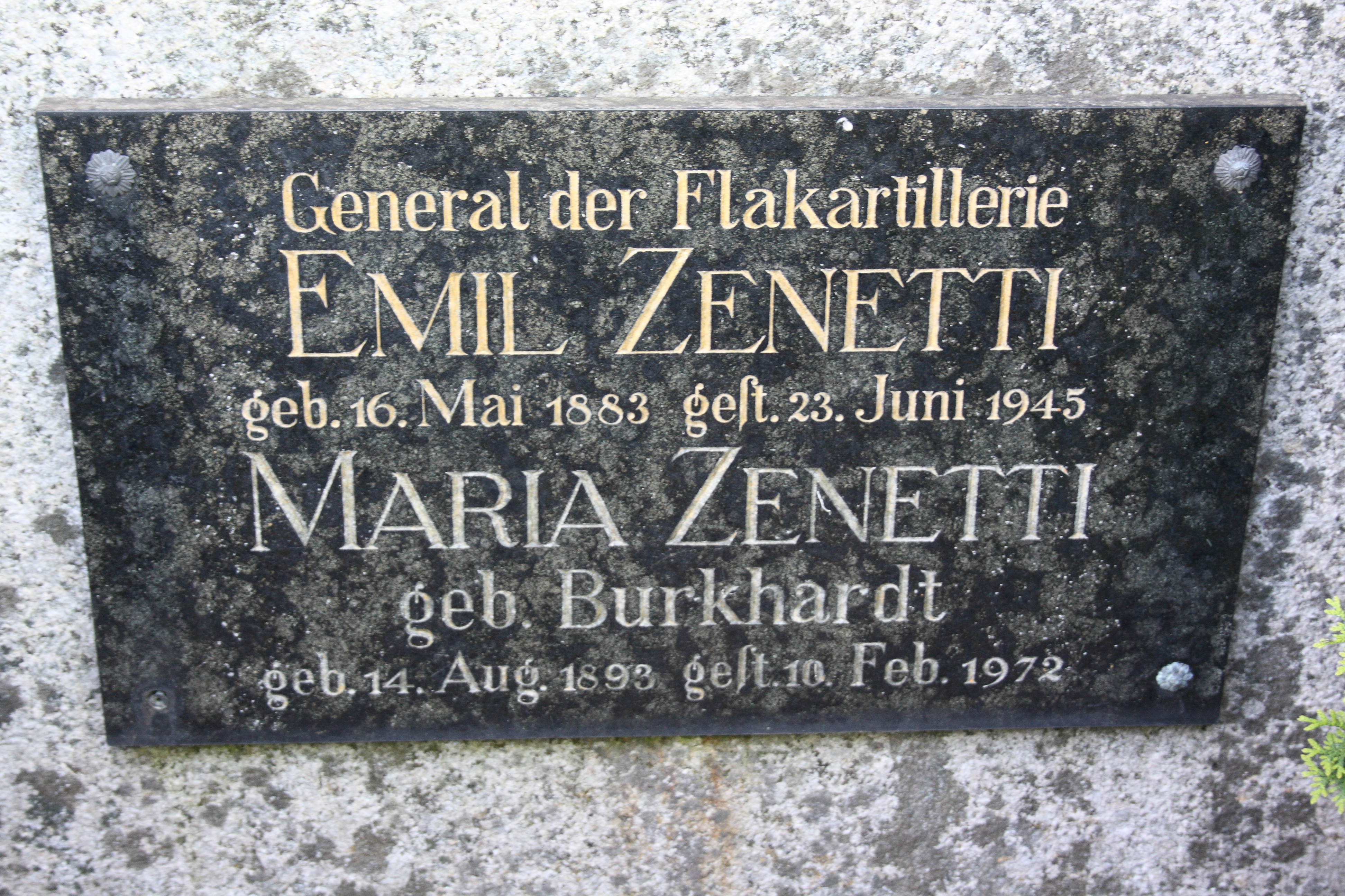 alter Friedhof (Johannesstraße 5) in Lauingen im Landkreis Dillingen ander Donau (Bayern)